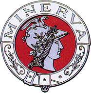 Logo Minerva. Embleem van bedrijf dat in 1934 ten onder ging.